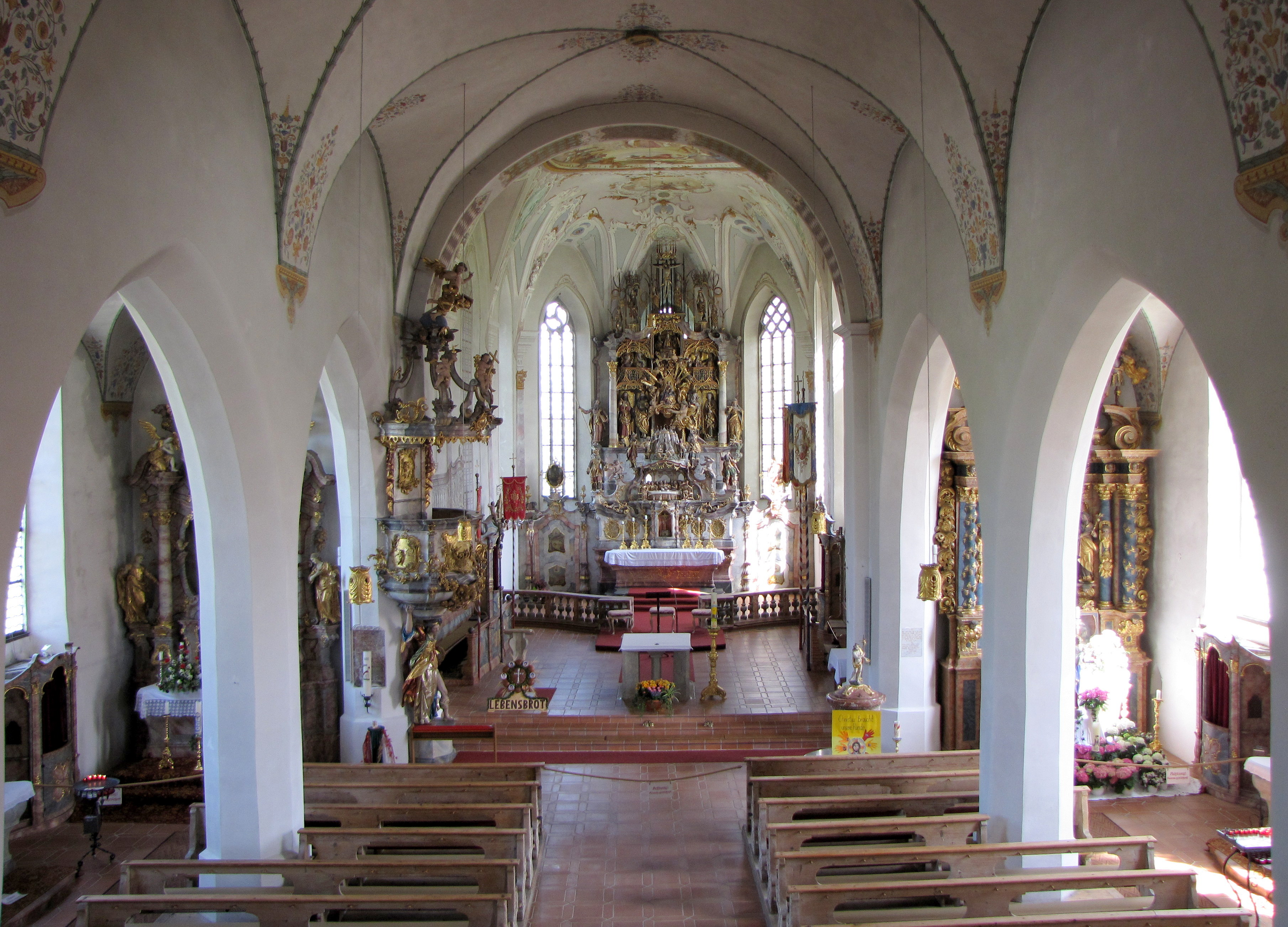 Innenraum der Wallfahrtskirche Maria Rain